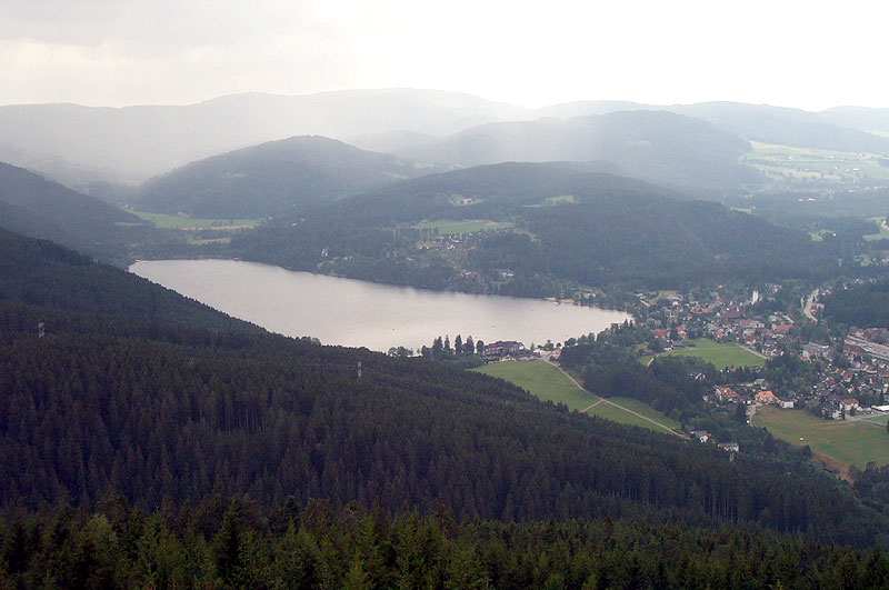 Blick auf den Titisee vom Hochfirst Quelle: Fotografiert im August 2003 Fotograf: Christian Maier Copyright Status: GNU FDL